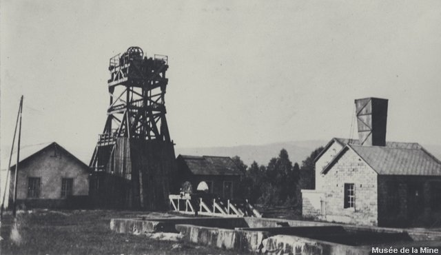 Le puits Notre-Dame assurant l'exhaure des houillères de Ronchamp.